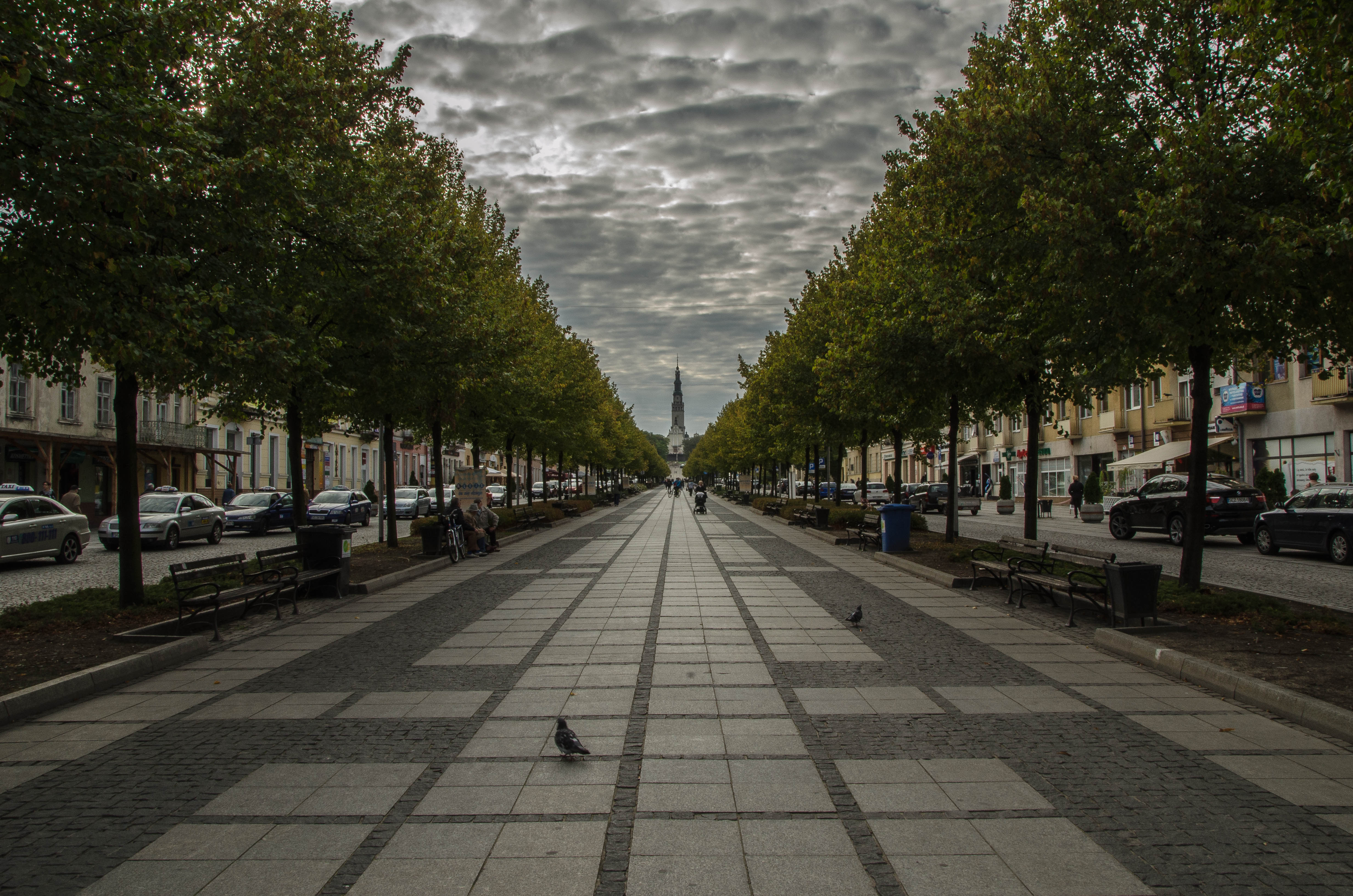 Częstochowa, układ urbanistyczny